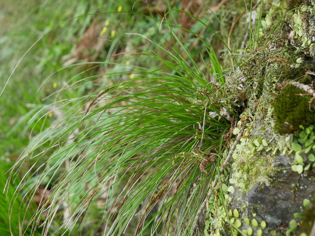 2019/05/16 徳島県：Tokushima Pref., Japan.